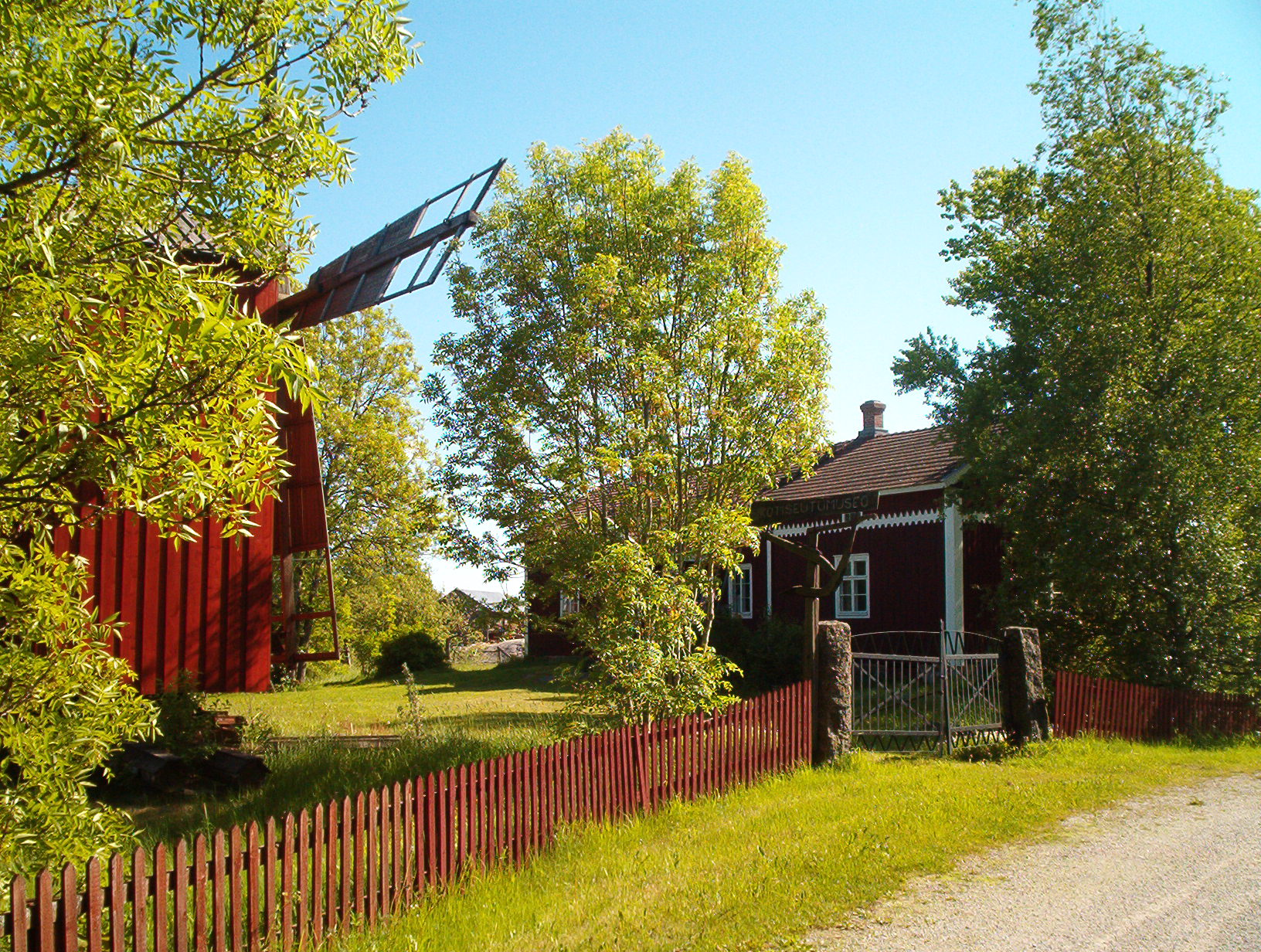 Kalannin kotiseutumuseo